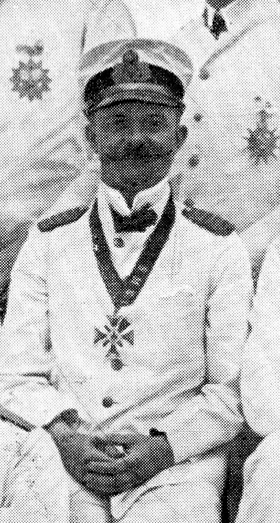 Korvettenkapitän Paul Ebert an Bord des Kleinen Kreuzers SMS CORMORAN am 3. August 1912 südlich von Palau bei einer Linientaufe. Bei dem "Orden" handelt es sich um ein Requisit der Linientaufe, das vom Meeresgott Neptun verliehen wurde